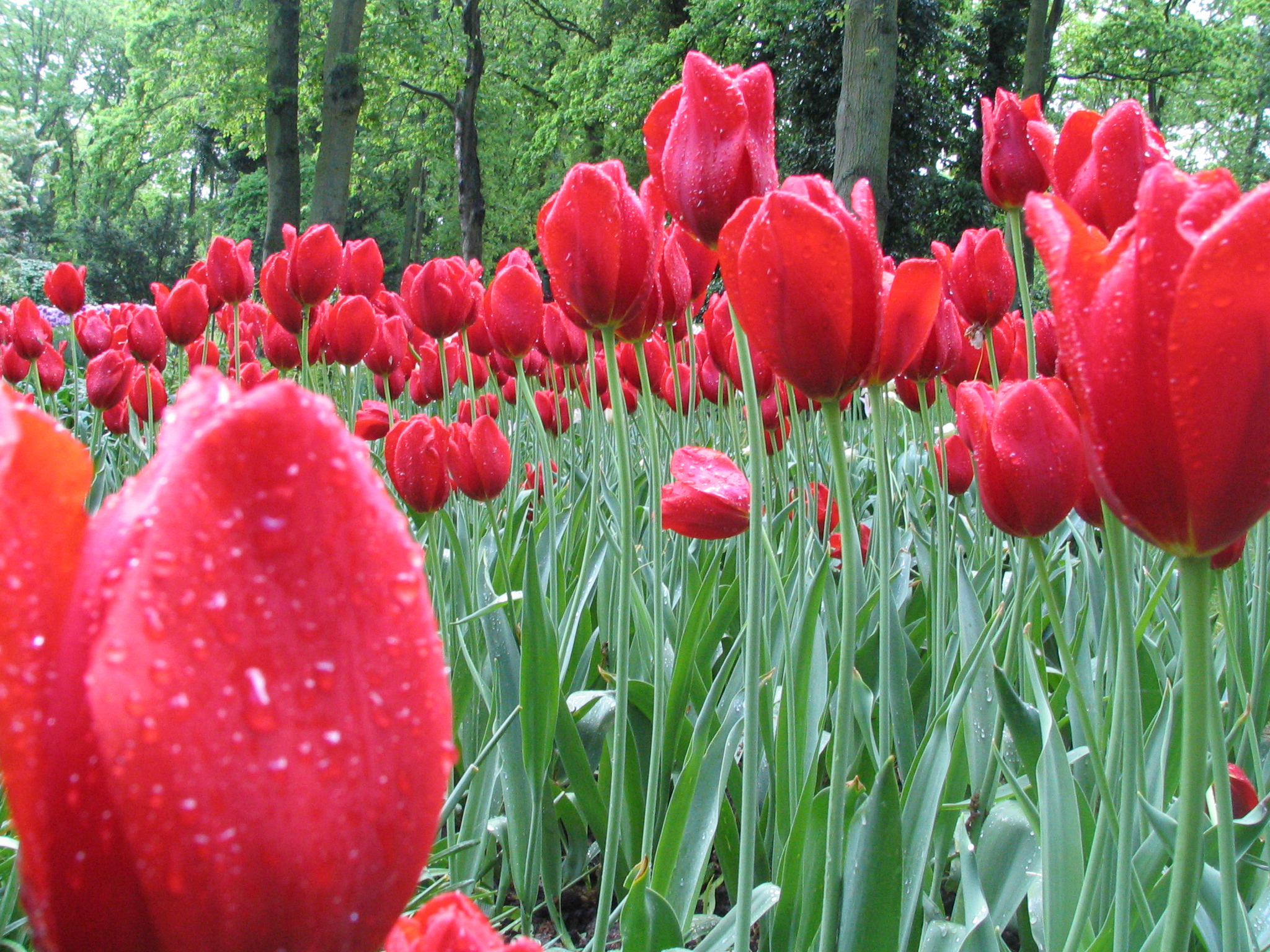 Tulips in Keukenhof